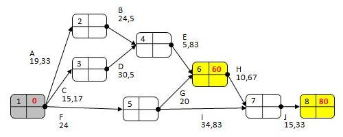 PERT-sivun kuvitusta, verkko 2.